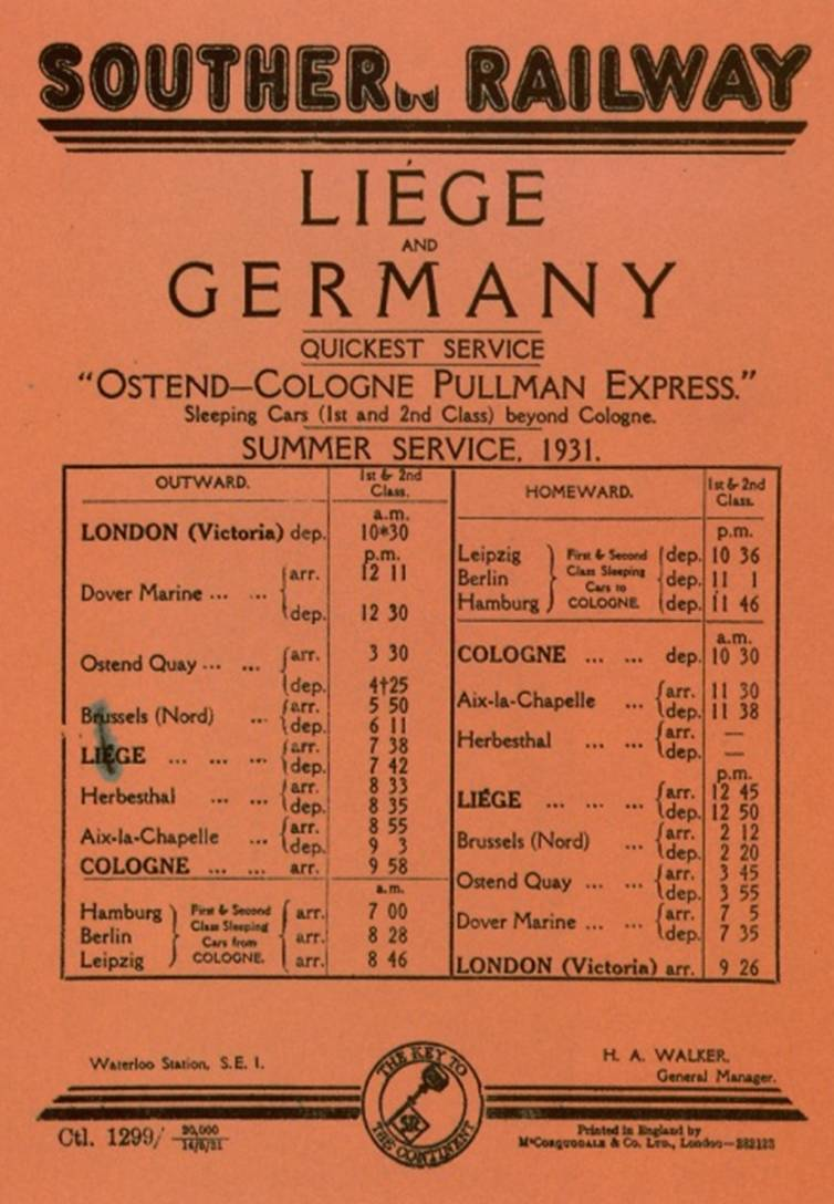 Fahrplan des Ostende-Köln-Pullman-Express, Timetable of Ostend-Cologne-Pullman-Express